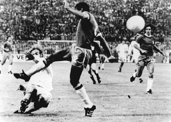 ADN-ZB-AP-Tele-3.7.74-ma-BRD-Dortmund: X. Fußball-Weltmeisterschaft-2. Finalrunde, Gruppe A: Niederlande - Brasilien 2:0- In der 50. Minute kann Johan Nesskens (Niederlande-links) zum 1:0-Führungstor einschießen. Die Abwehraktion von Luís Pereira (Brasilien-Mitte) kommt zu spät.